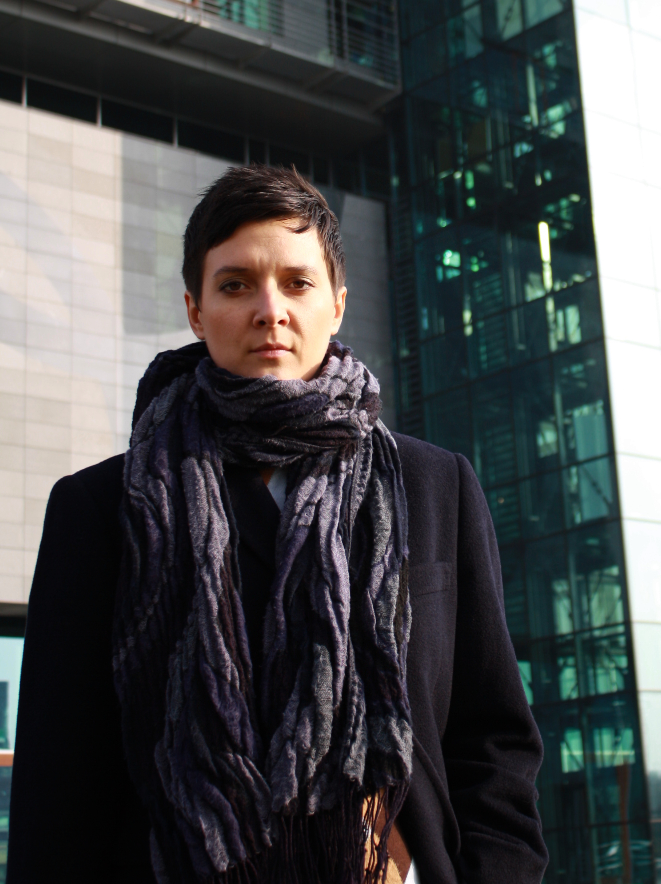 Klaudia Pasternak - Centrum Olimpijskie, Warszawa 2010